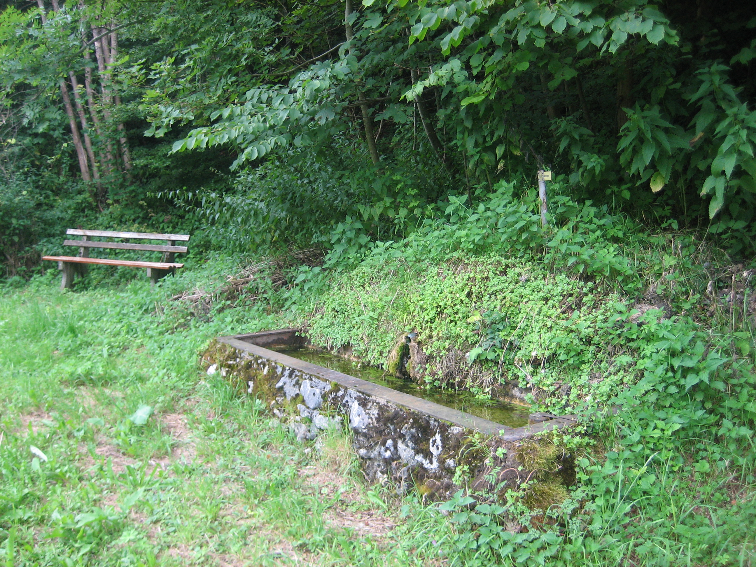 der Weilertalbrunnen liegt in Talschlauch der Zufahrt zum Killertal an einer Ausweichstelle